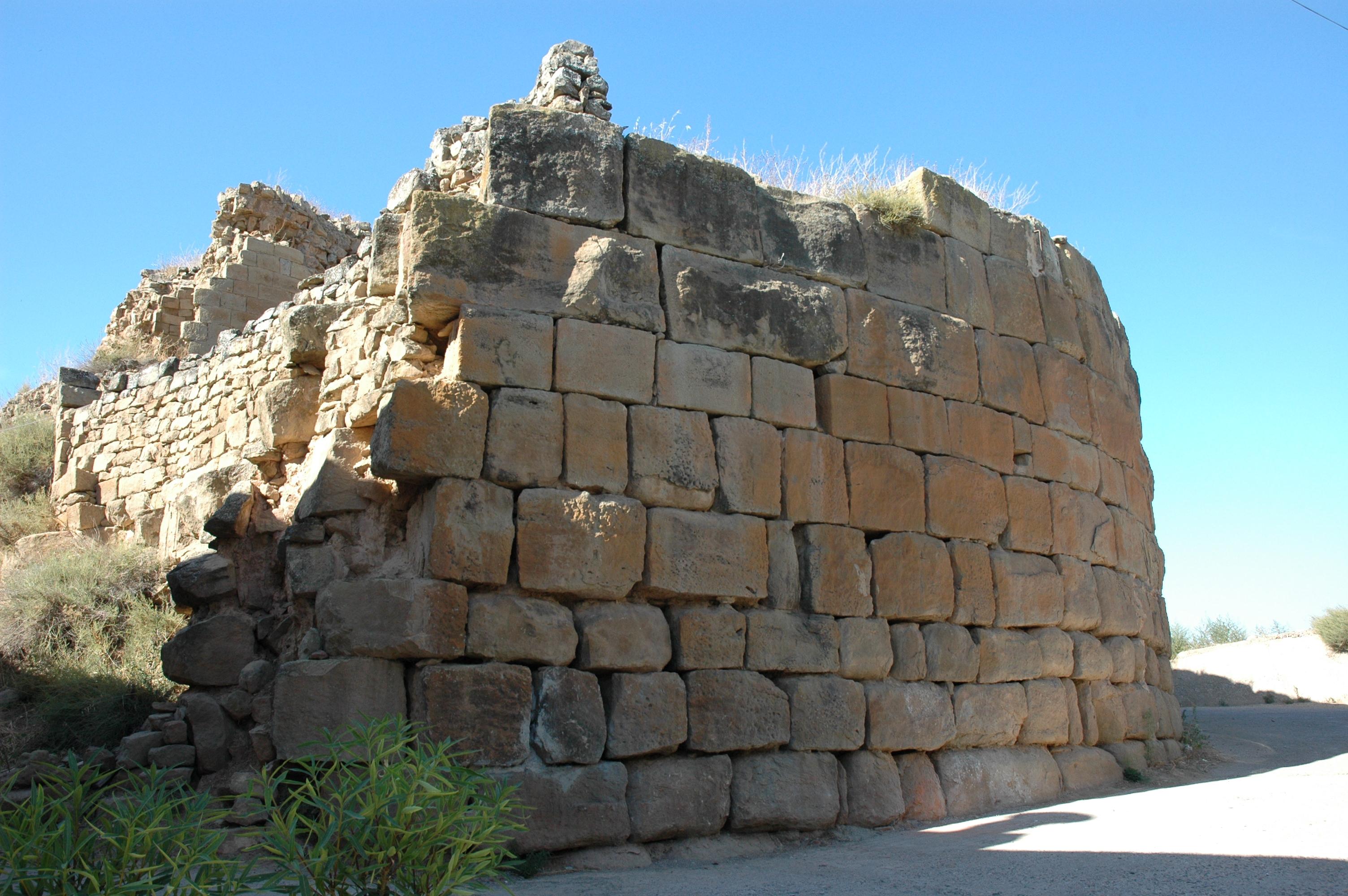 Castell de Castellnou d'Ossó